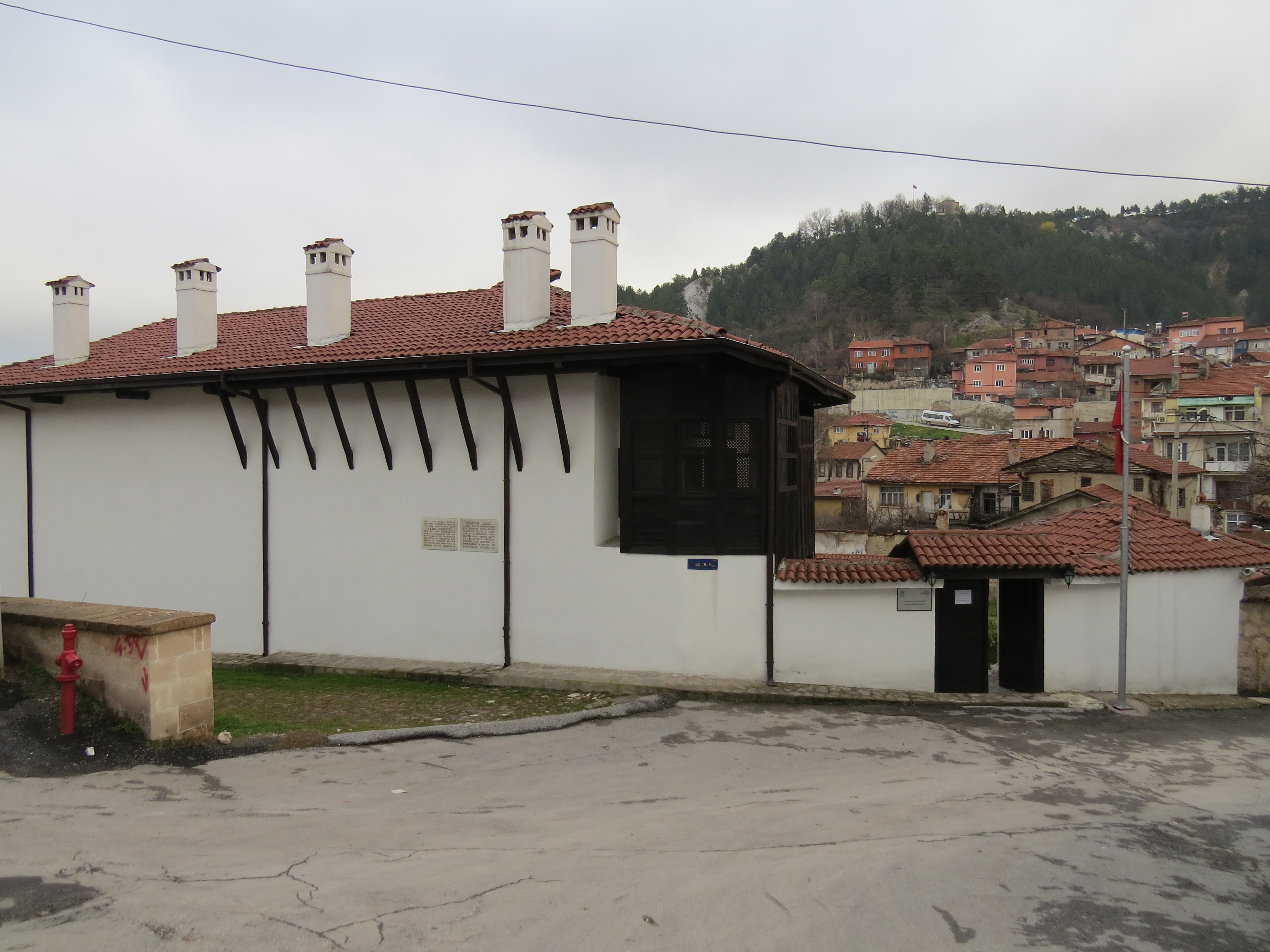 Kossuth Evi Müzesi (Macar Evi)